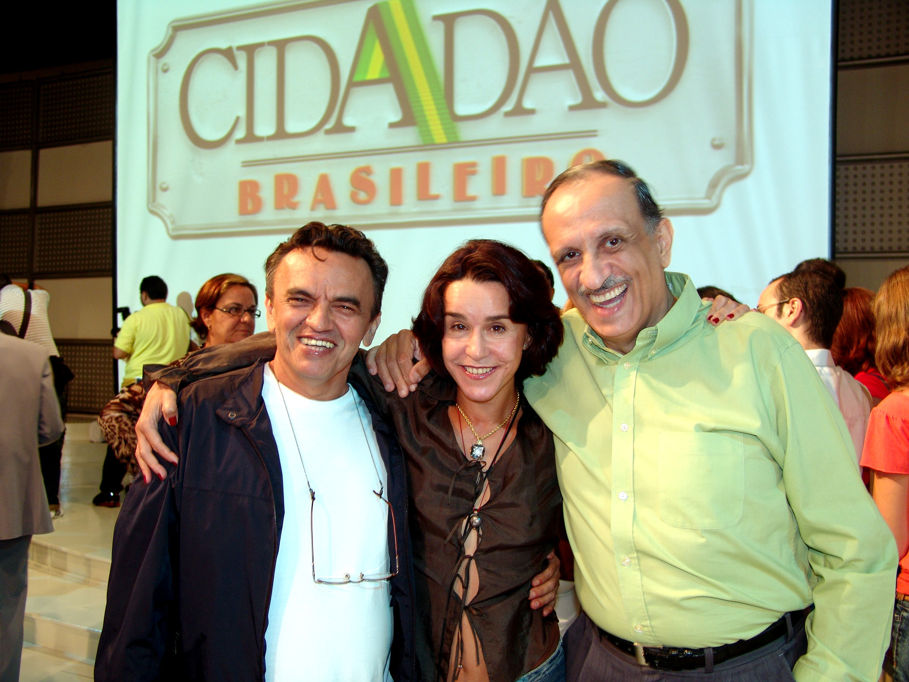 Os atores brasileiros José Dumont (à esquerda), Lucélia Santos e Benvindo Sequeira.Jose Dumont,Lucelia Santos,Benvindo Sequeira